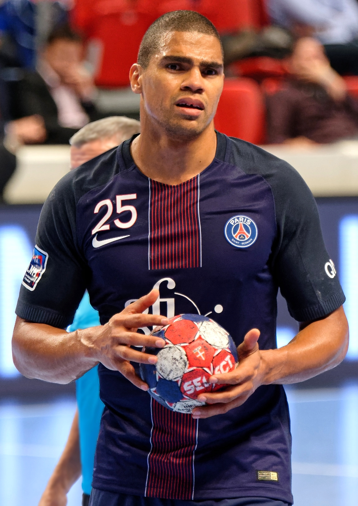 Rencontre de championnat entre le PSG et Pays d'Aix handball. A Coubertin, le 2 juin 2016.